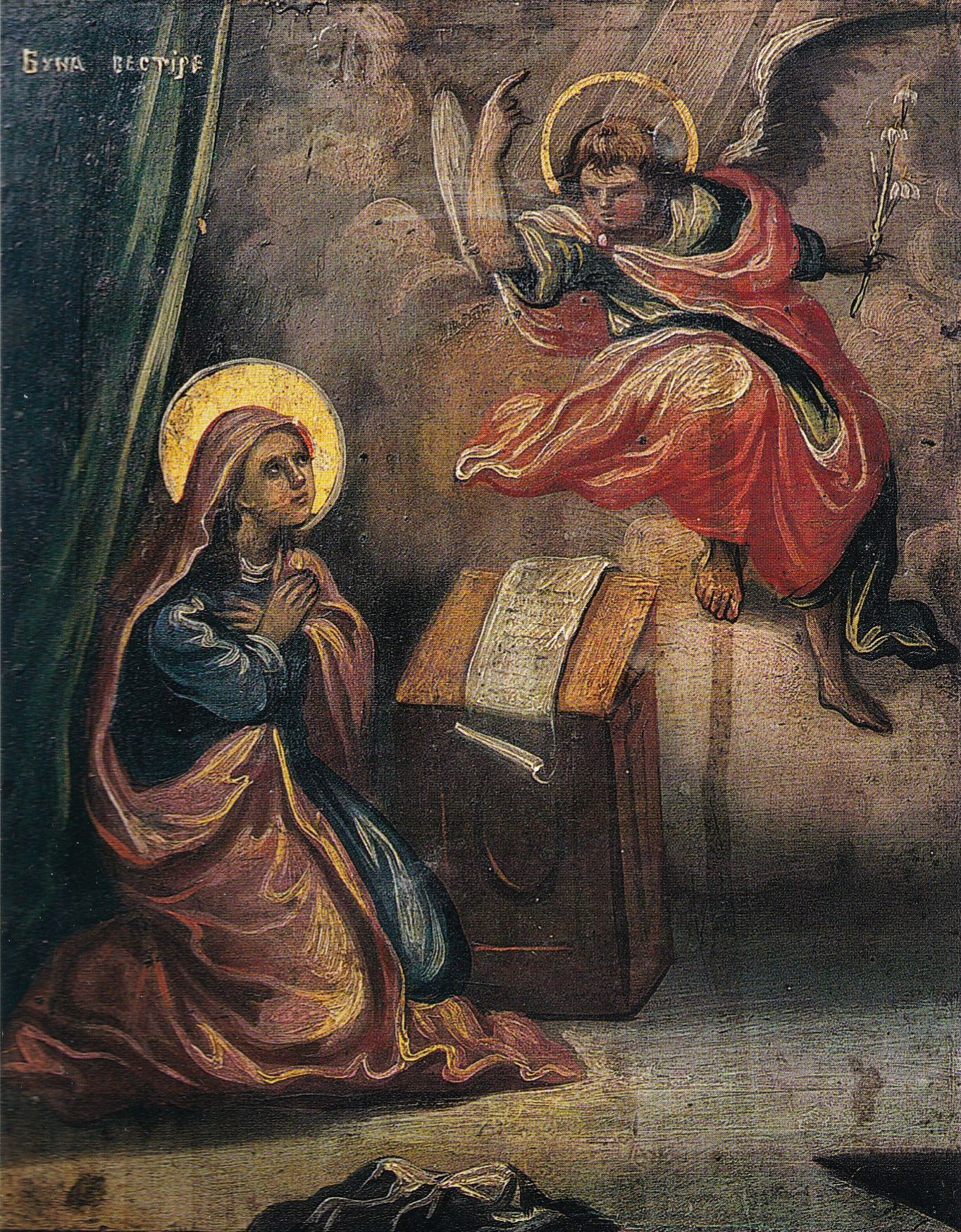 Nicolae Grigorescu - Icoana Bunavestire de la biserica din Băicoi